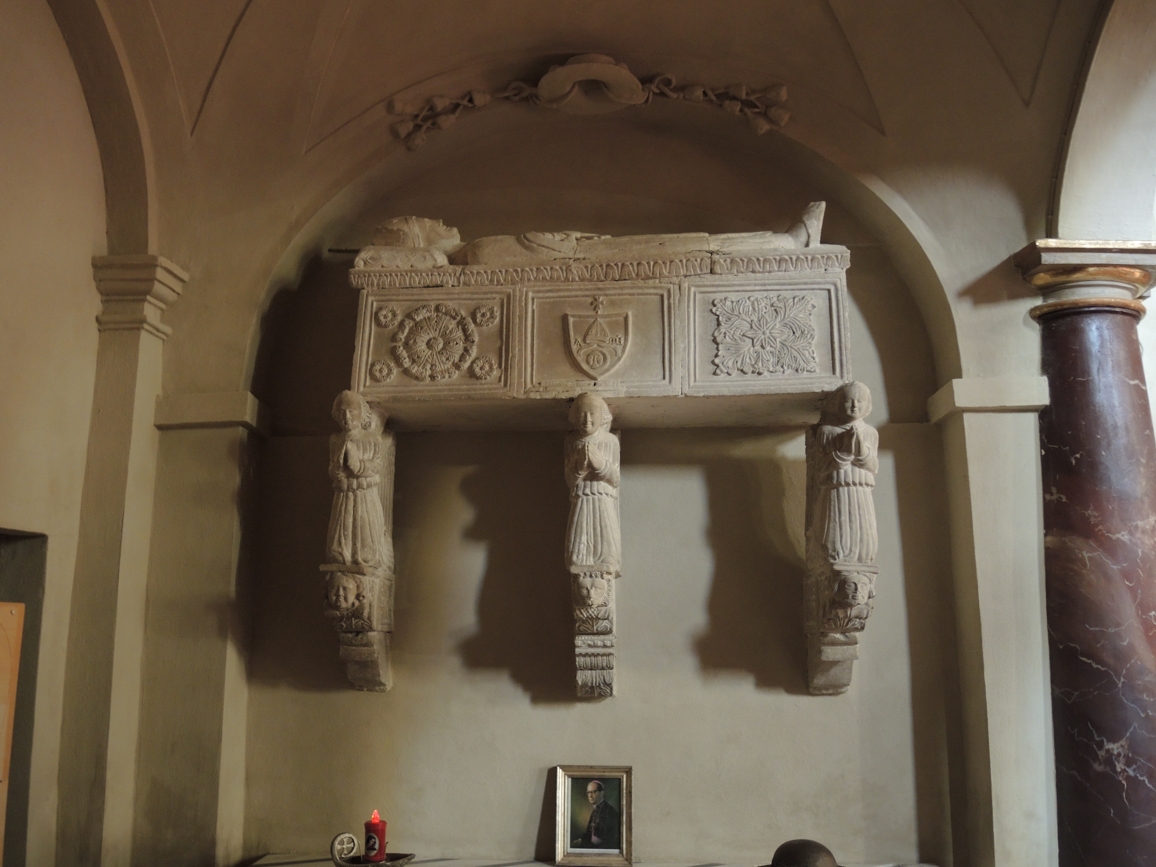 Città Sant'Angelo: Collegiata di San Michele Arcangelo